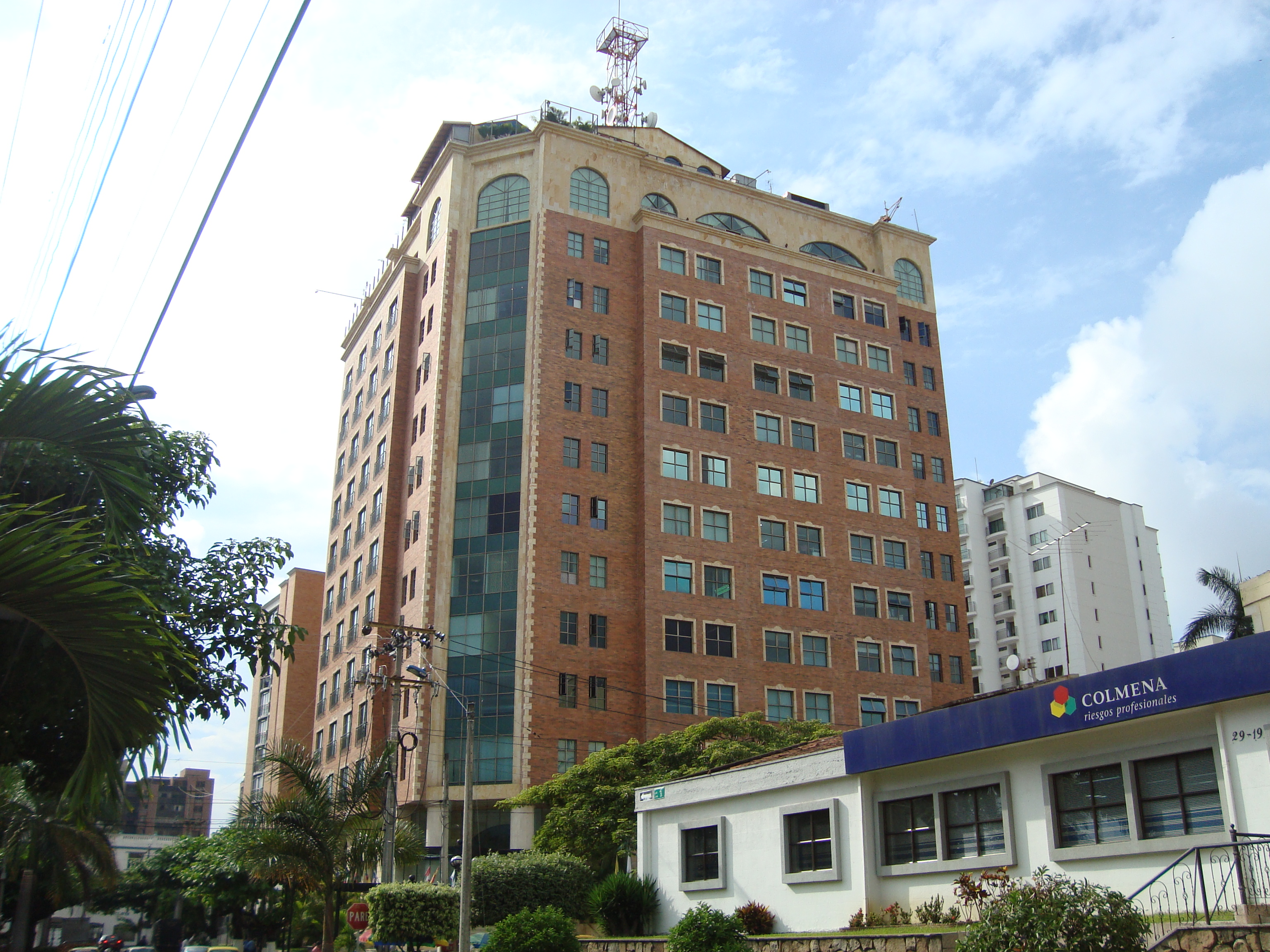 El Hotel Dann Carlton es de los más reconocios a nivel latinoamericano, y es una cadena de origen Colombiano, 5 estrellas. En Bucaramanga está ubicado en Cabecera del Llano, una de las zonas más prestigiosas de la ciudad.